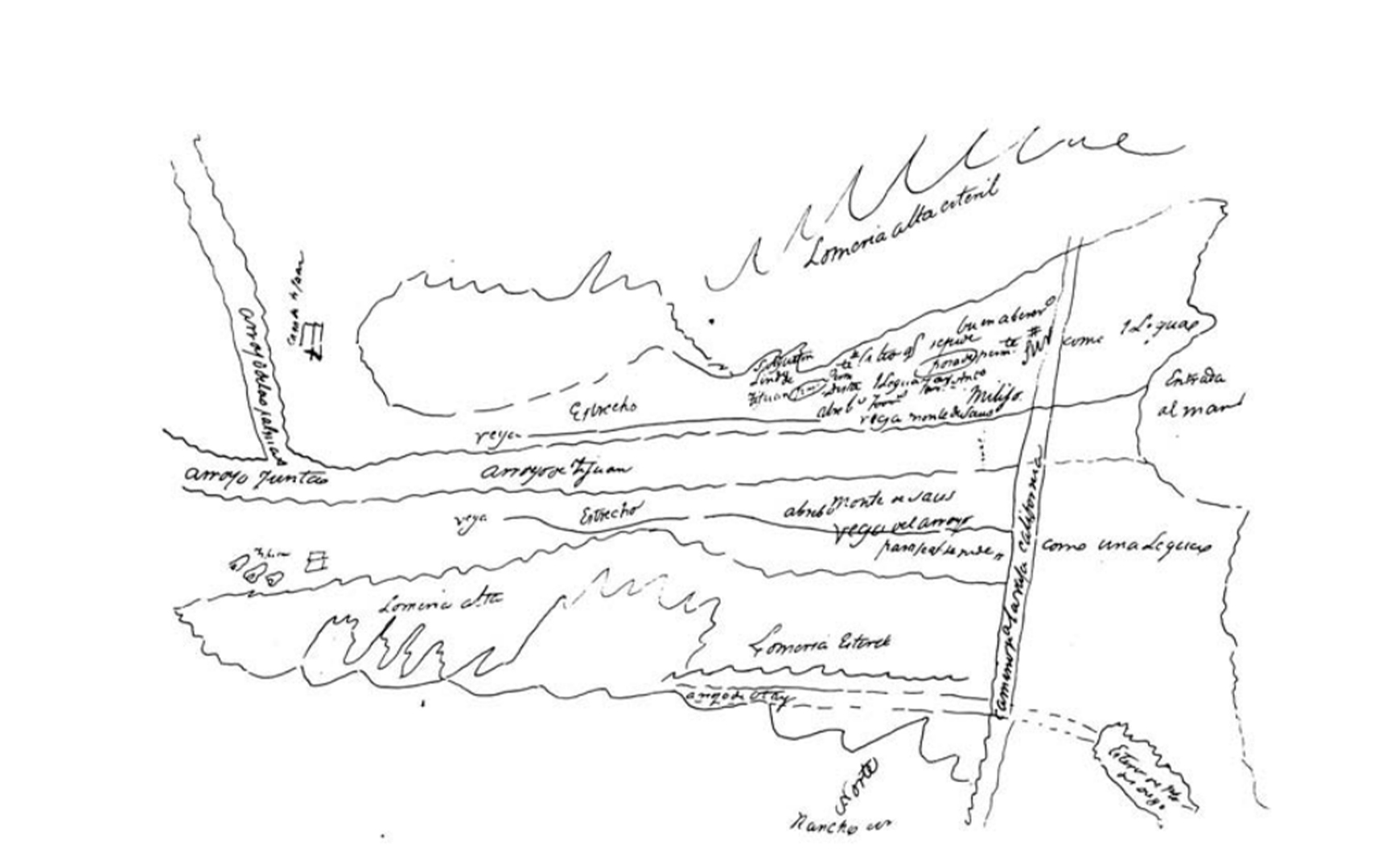 Dibujo de un posible mapa del Rancho de Tijuana en 1827